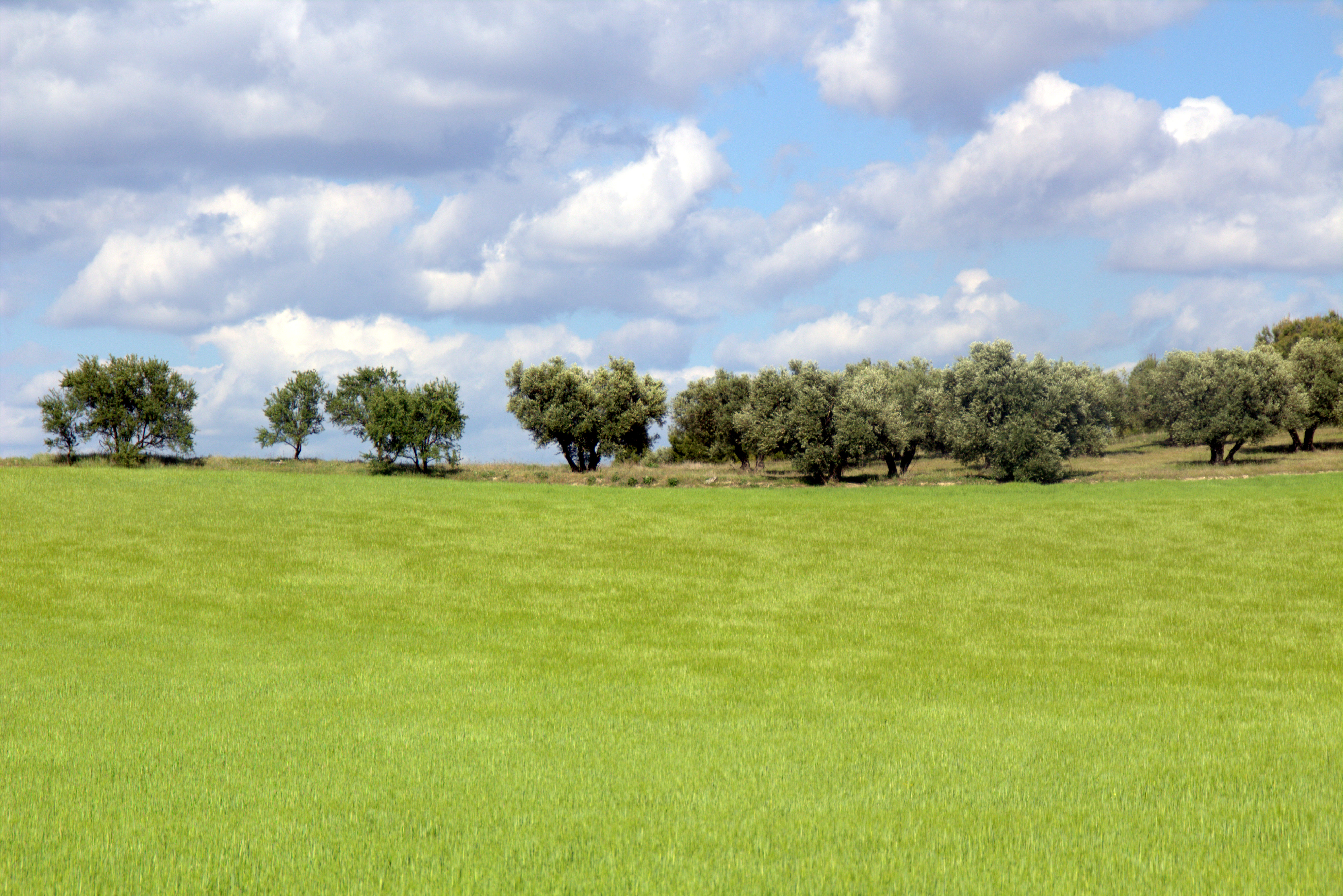 paisajes de Valdemoro (Madrid)